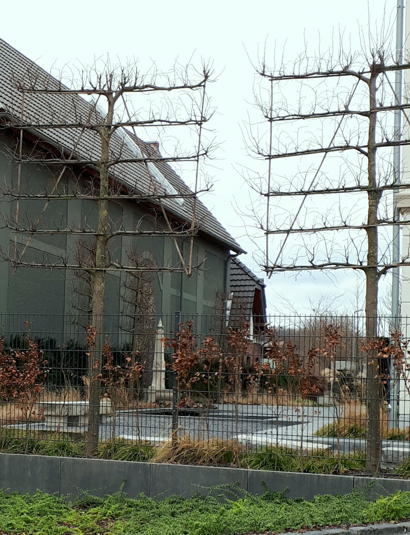 Garten von Gut Kaisersruh, Aachen-Würselen, nach dem Umbau 2019